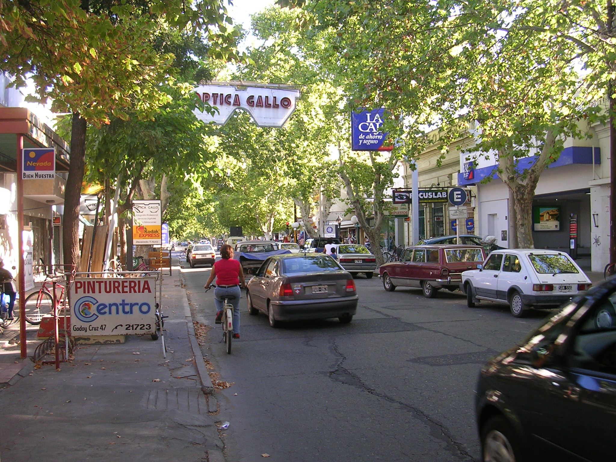 Calle de San Rafael, Provincia de Mendoza, Argentina.